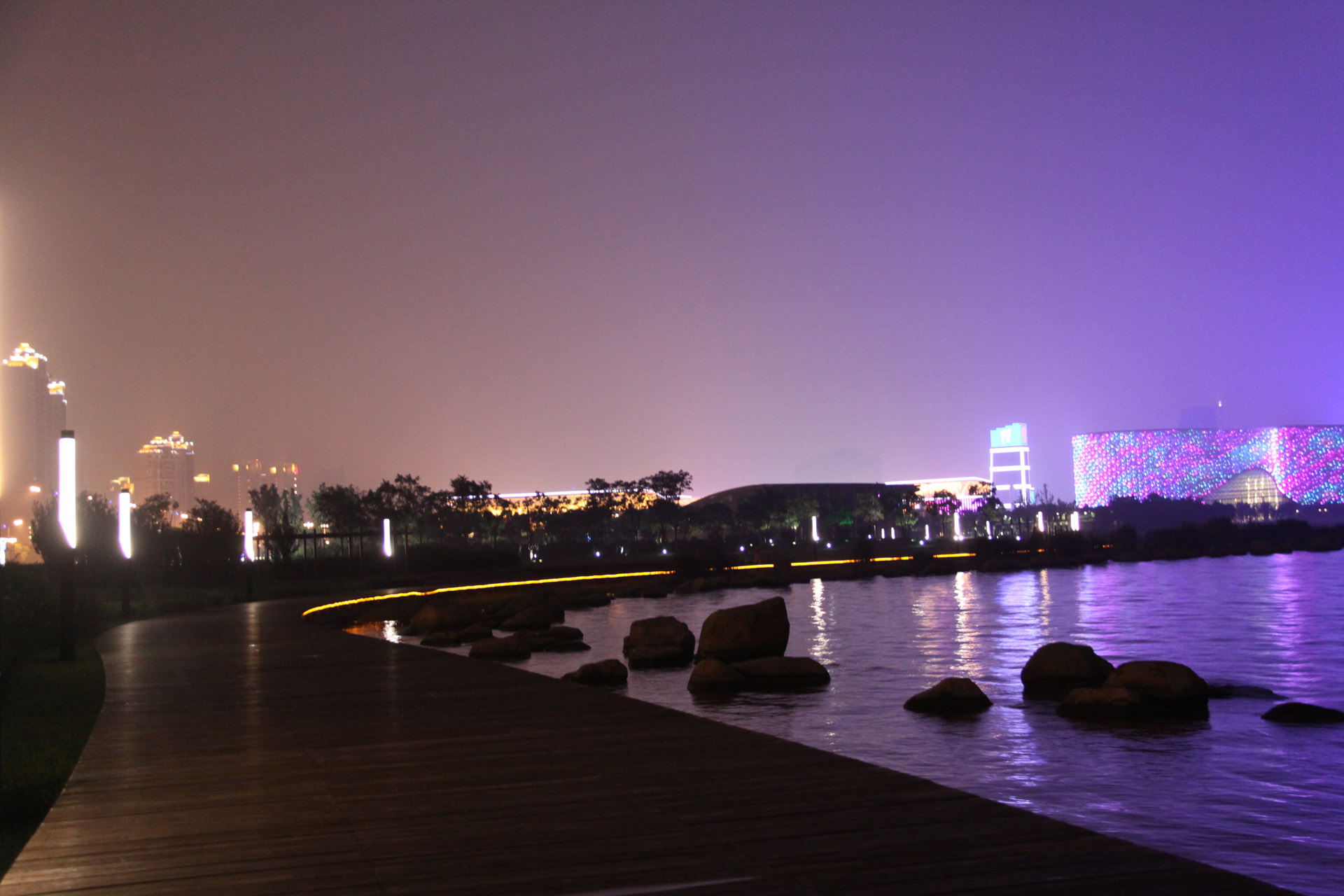 Jinjihu,Suzhou,China